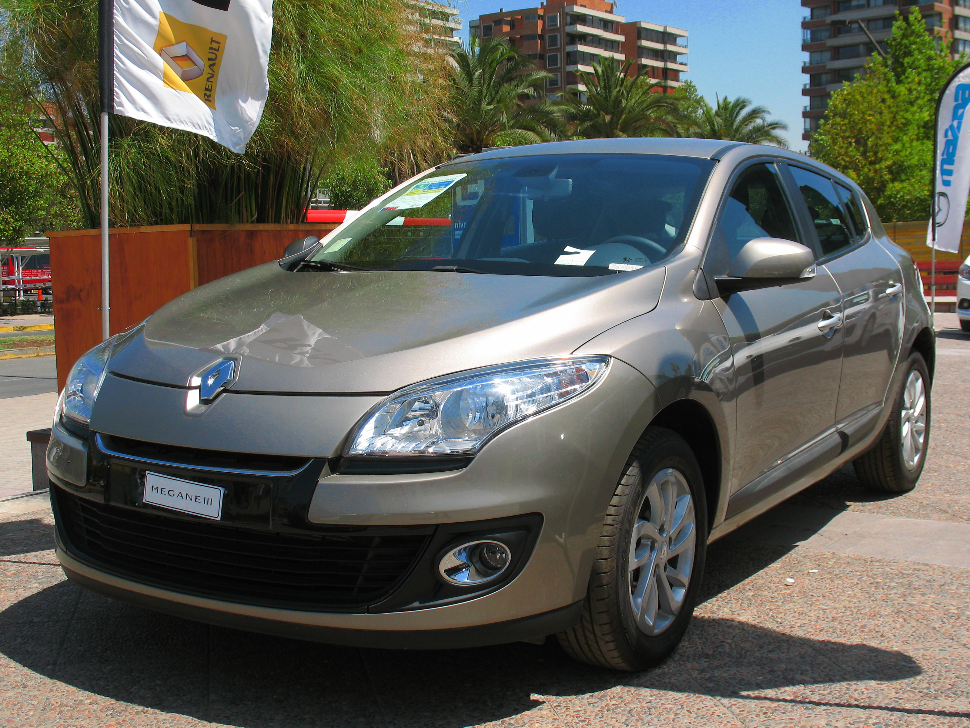 Renault Megane 2.0 Dynamique 2014